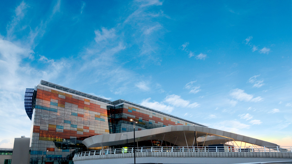 Zvartnots International Airport, Yerevan, Armenia